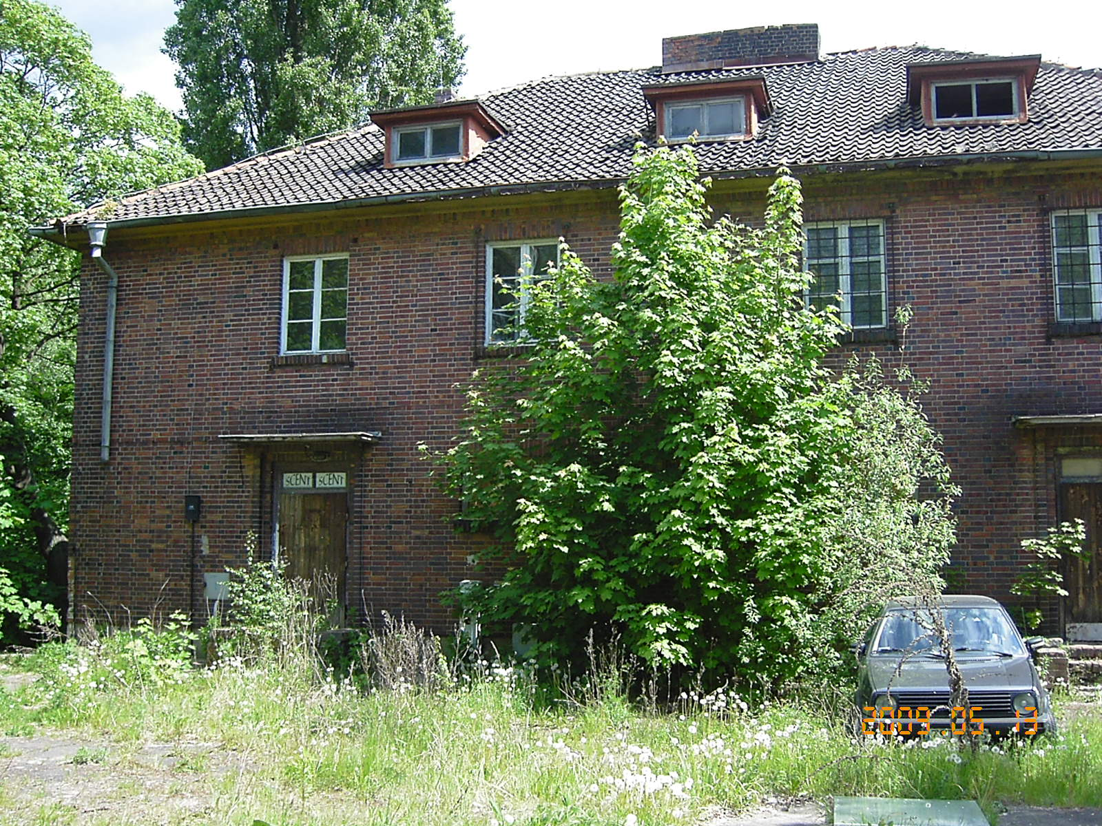 Byłe koszary WOP przy ulicy Przestrzennej w Szczecinie